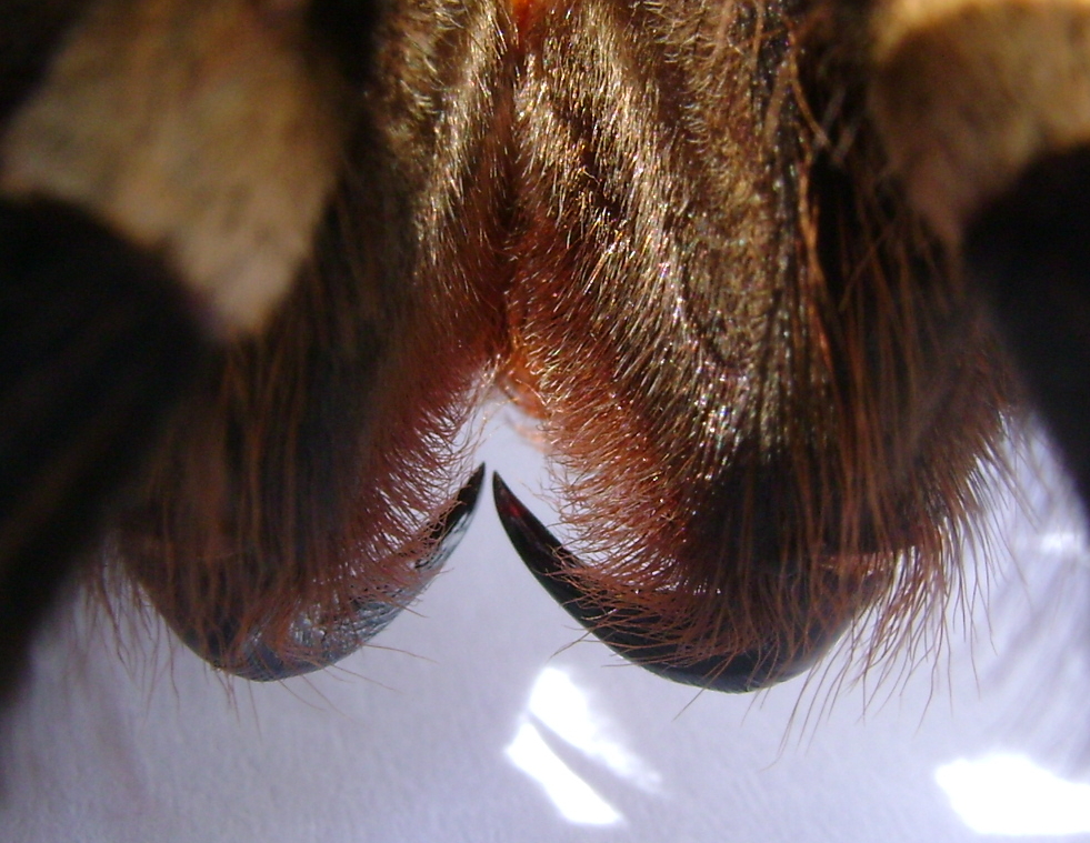 Kieferklauen (Cheliceren) der Hülle (nach Häutung; also ohne Tier) einer Vogelspinne der Art Acanthoscurria geniculata. Zum Zeitpunkt der Häutung war sie circa 2 Jahre alt.